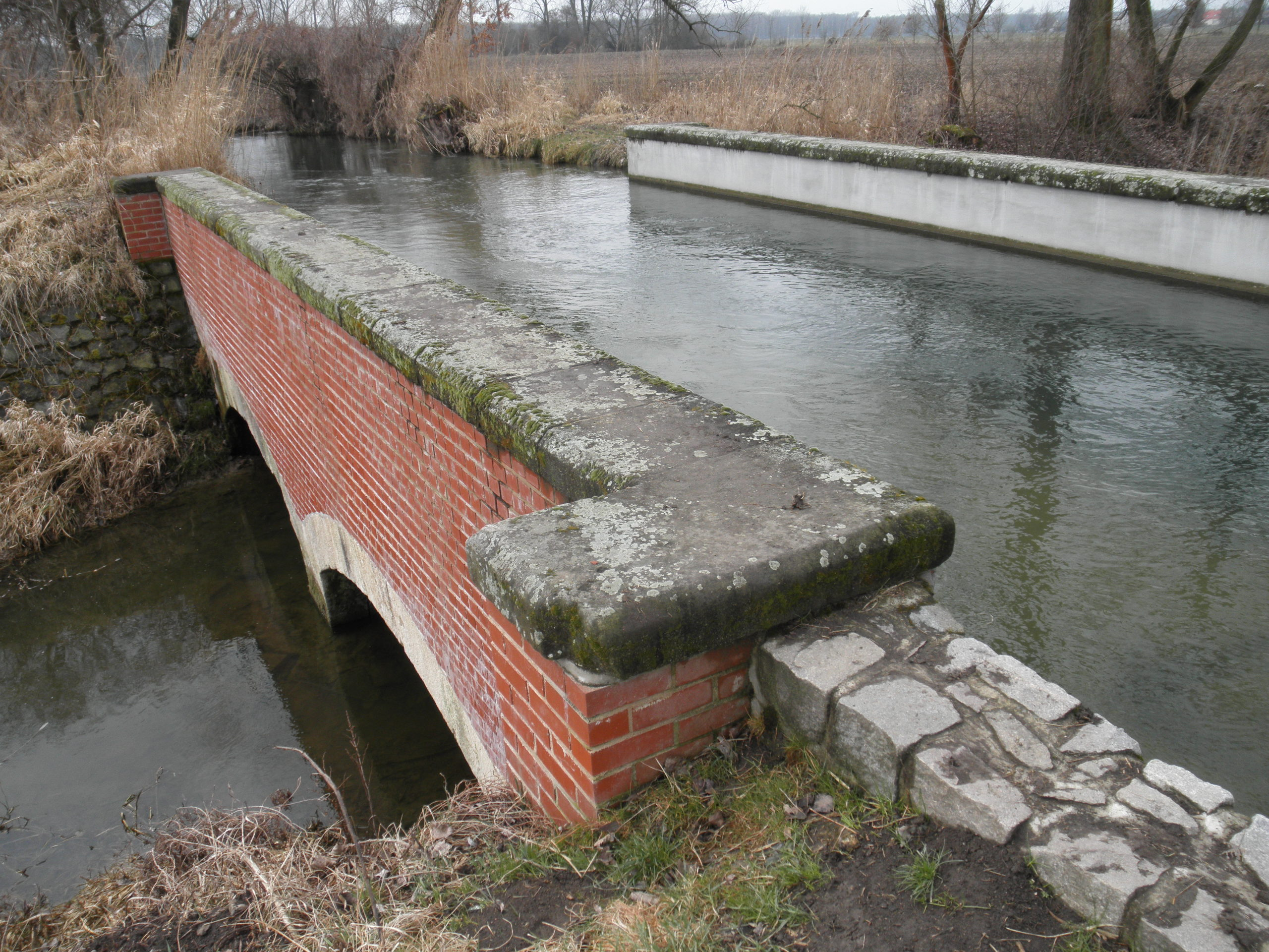 Velký sezemický akvadukt